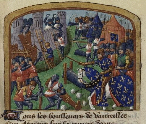 Le siège de Caen, par Martial d'Auvergne, enluminure issue de l'ouvrage Vigiles de Charles VII, Paris, France, XV°siècle.